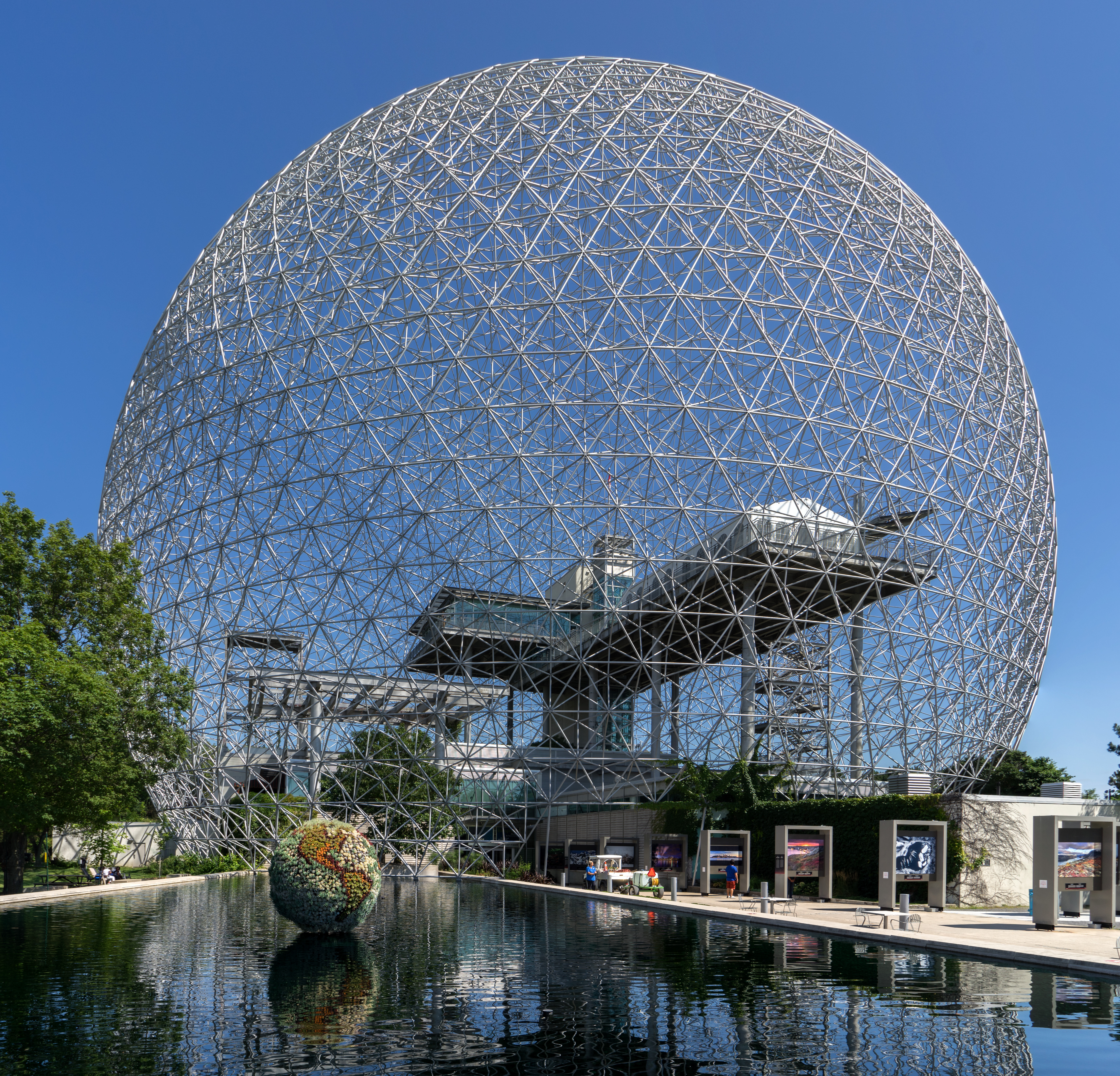 Biodome, Montreal